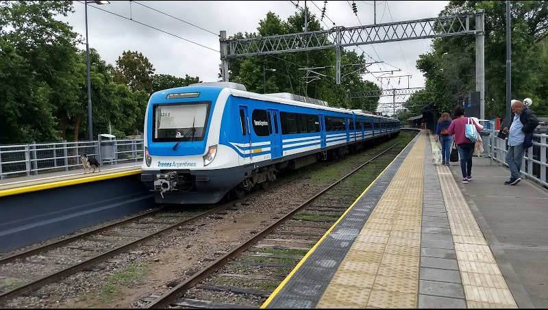 La estación Villa España, después de inaugurado el servicio eléctrico.